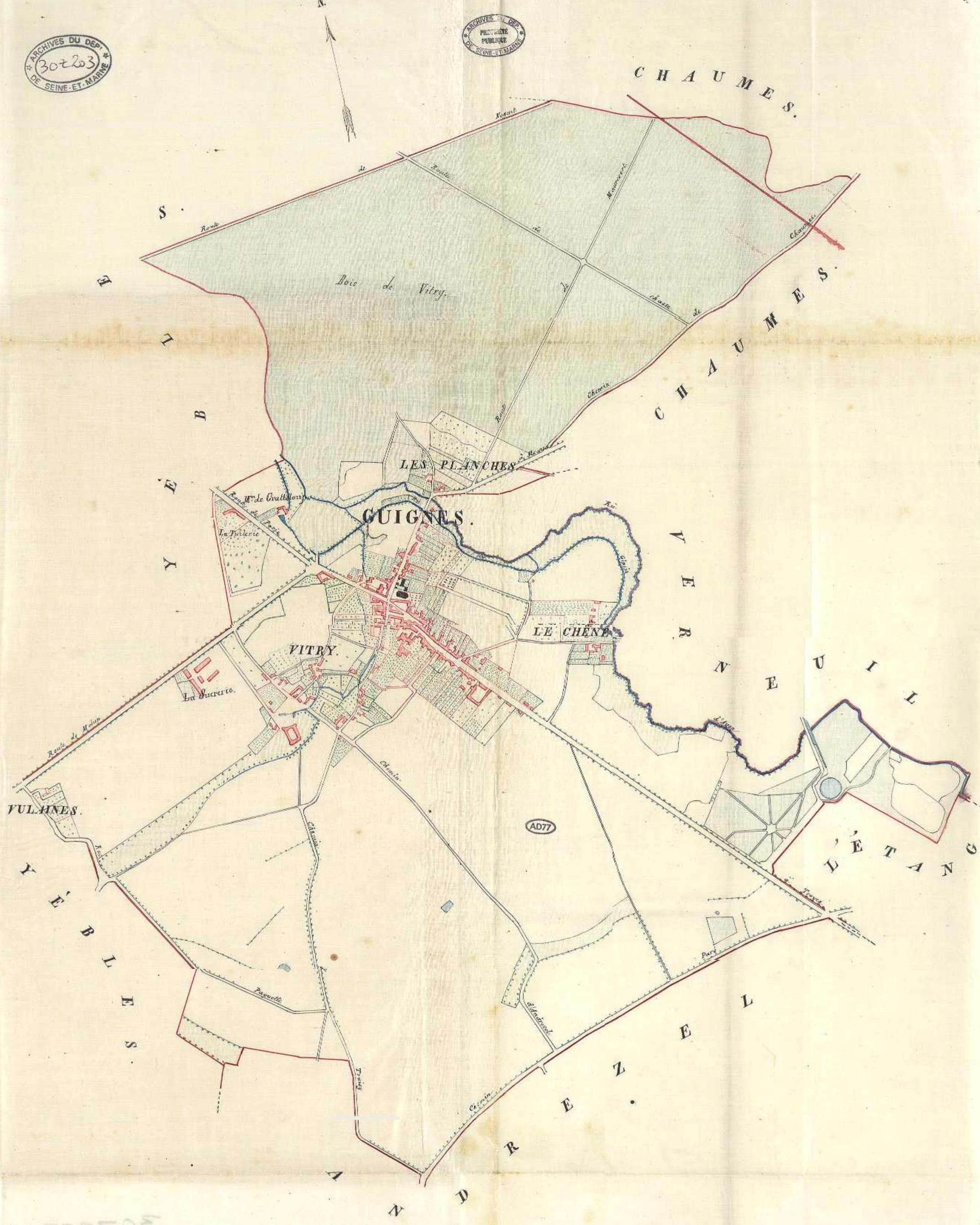 Plan de Guignes au XIXeme siècle